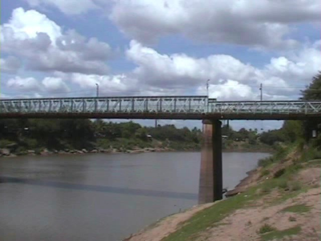 גשר. זכויות היוצרים על התמונה שייכות לי.